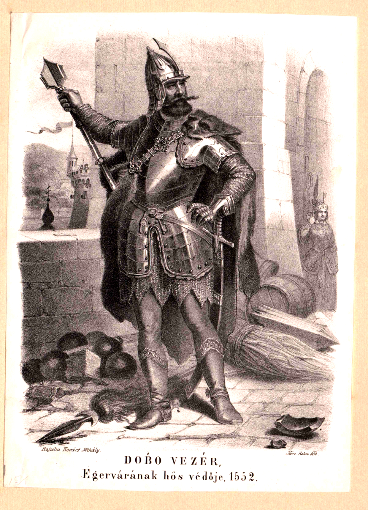 Dobó István az egri vár védőinek kapitánya